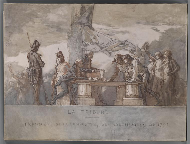 etude de la trimune pour L'Enrôlement des volontaires de 1792 Joconde database: entry 07980002424